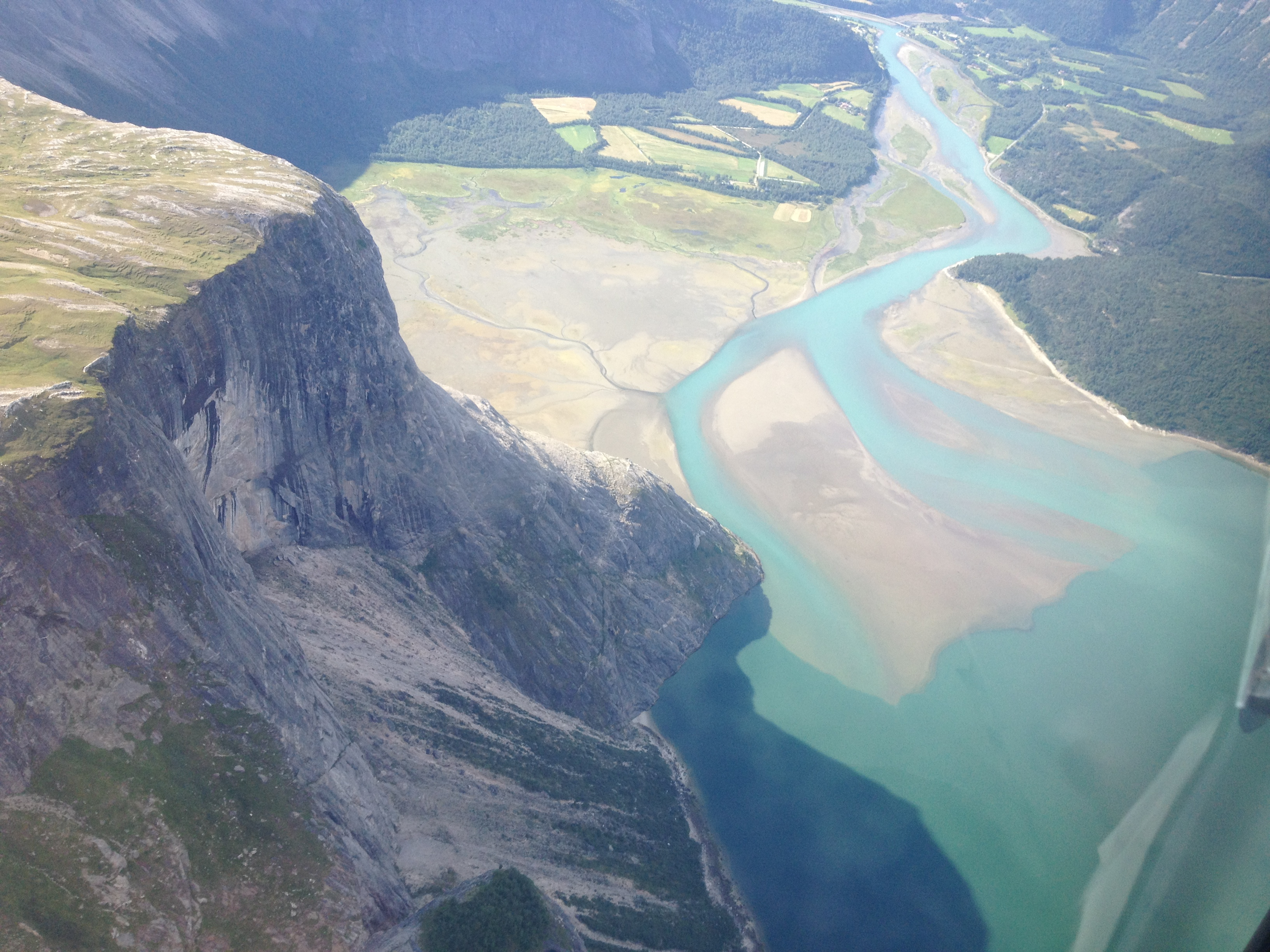 River Beiarelva and Mont Segelfjell, Nordland, Norway.